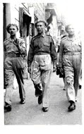 Wacław Chojna z lewej II Korpus Polski Włochy 1945